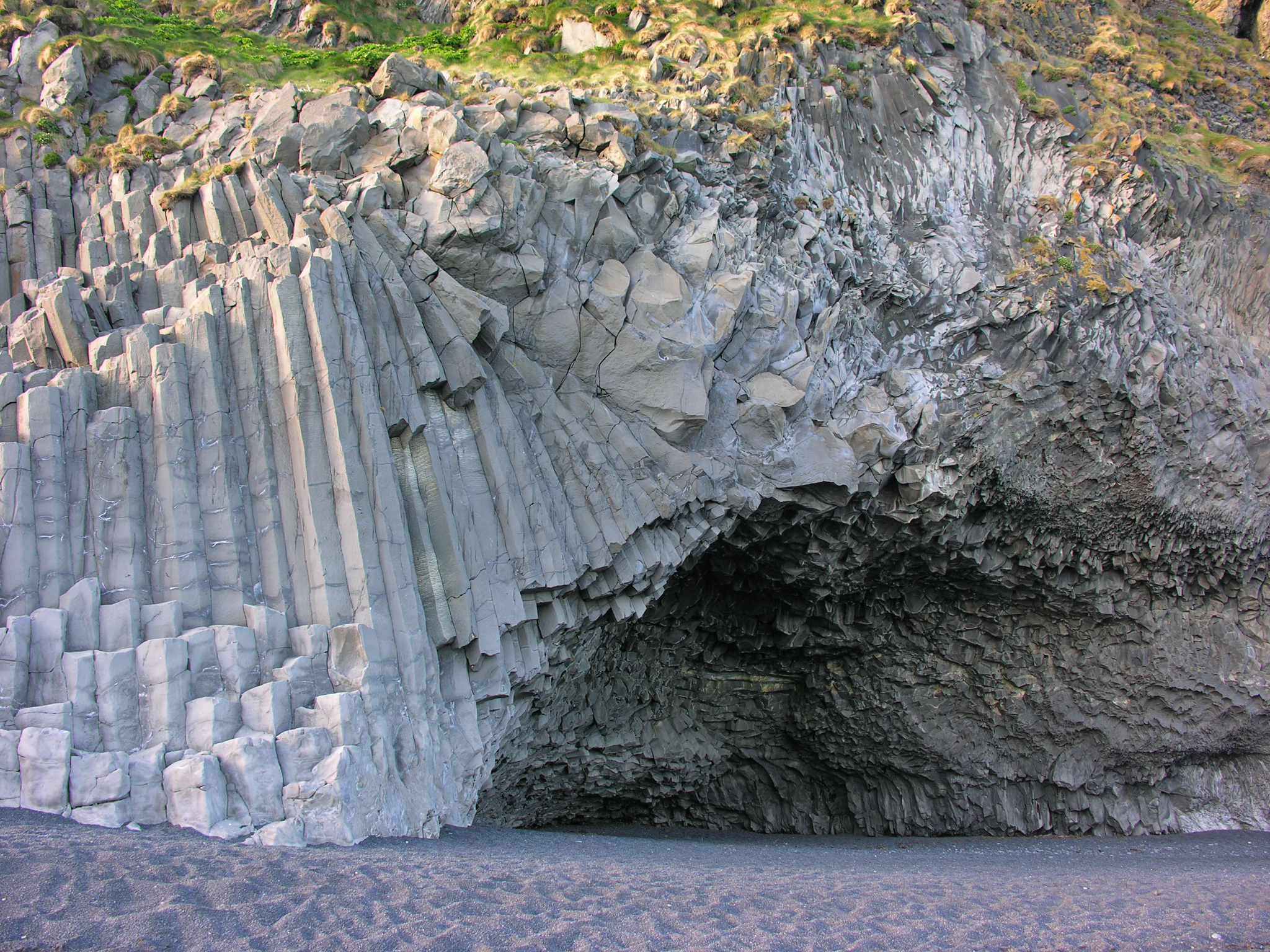 Iceland, Reynir near Vík í Mýrdal